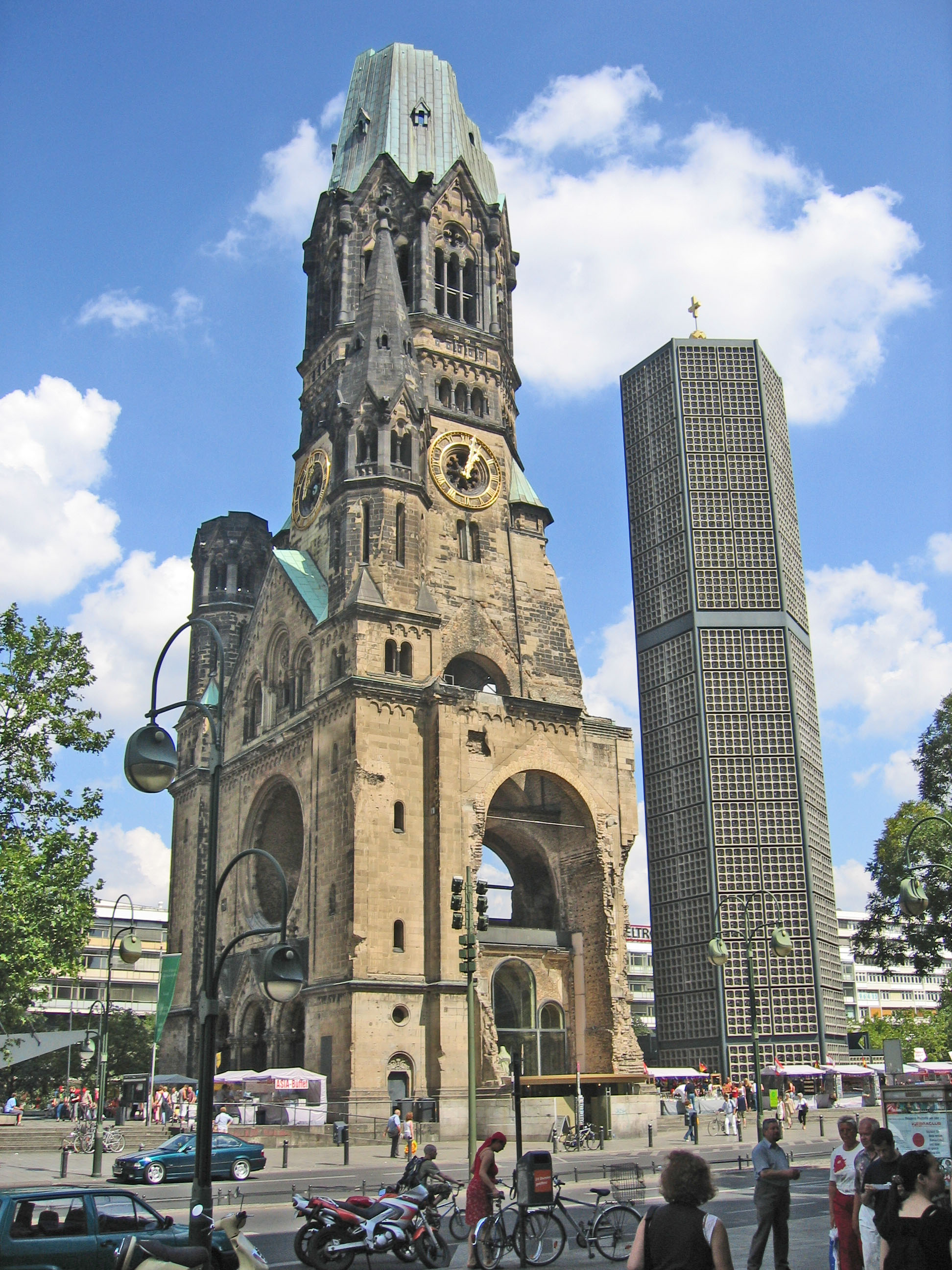 Sujet:Keeser_Wilhelm_Gediechtniskierch zu Berlin